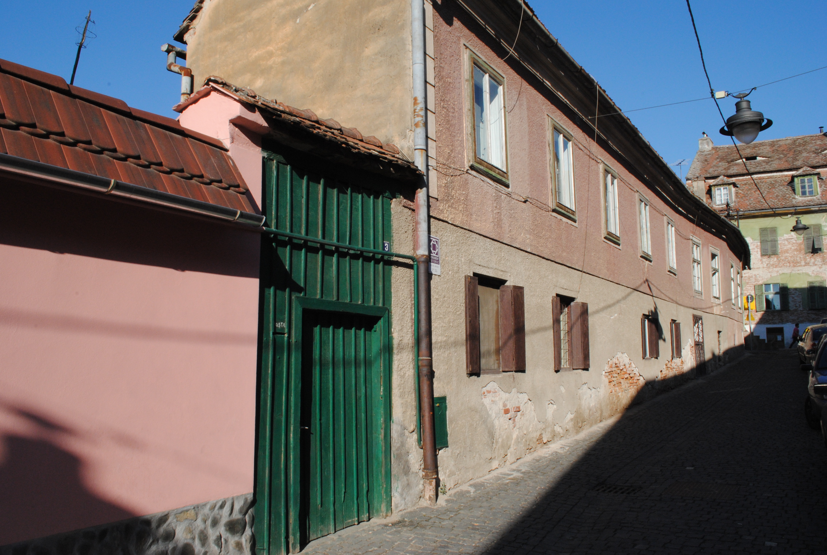 Casă, a doua jum. sec. XV - prima jum. sec. XVI, sec. XVII; prima jum. a sec. XX